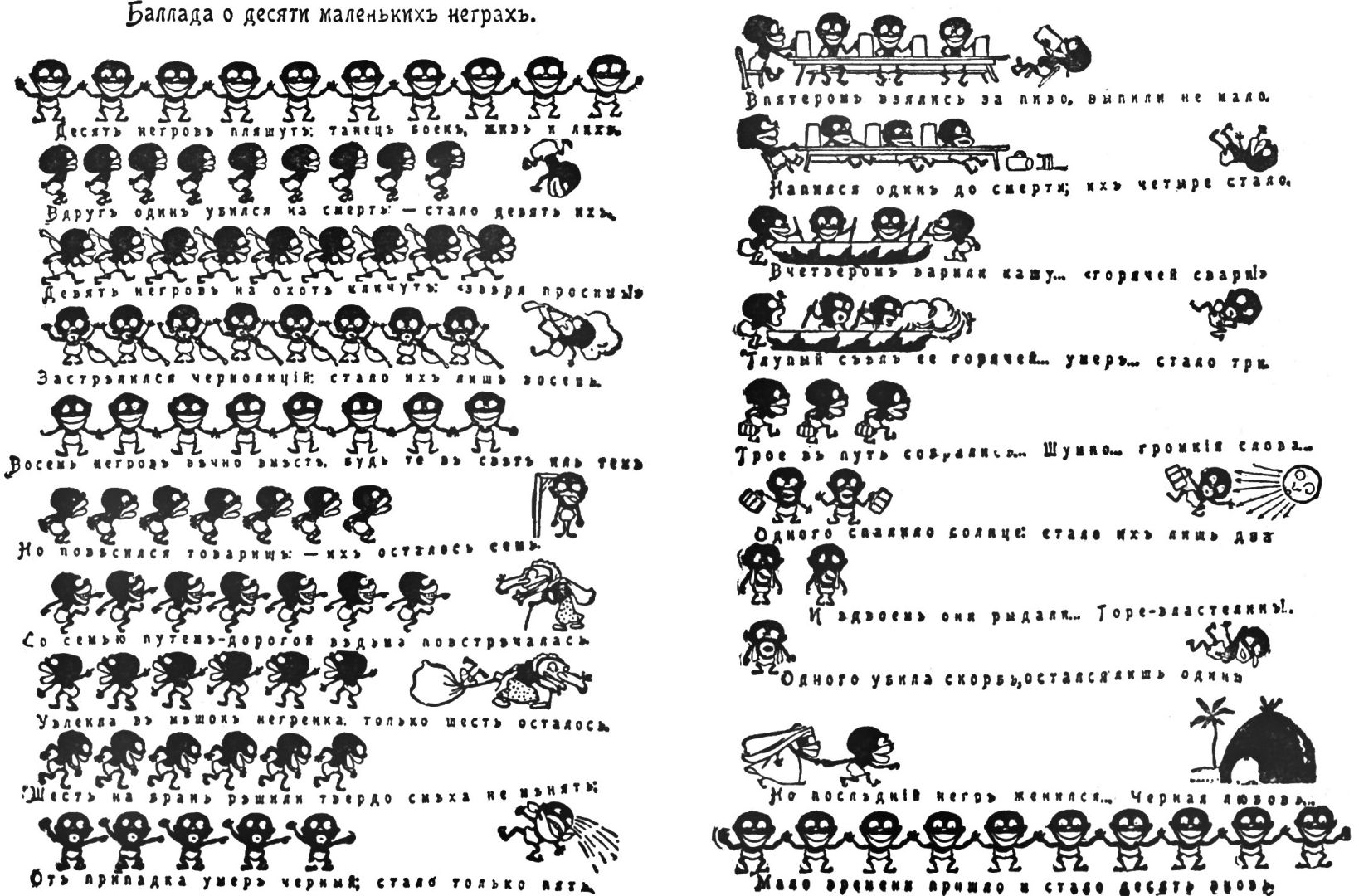 Стихотворение и комикс, опубликованные в журнале «Огонёк», № 50, 1903. Баллада о десяти маленьких неграх Десять негров пляшут: танец боек, жив и лих.Вдруг один убился насмерть — стало девять их. Девять негров на охоте кличут: «Зверя просим!»Застрелился чернолицый: стало их лишь восемь. Восемь негров вечно вместе. Будь то свет иль темь,Но повесился товарищ — их осталось семь. Со семью путём-дорогой ведьма повстречалась.Увлекла в мешок негрёнка. Только шесть осталось. Шесть на брань решили твёрдо смеха не изъять:От припадка умер чёрный: стало только пять. Впятером взялись за пиво, выпили немало.Напился один до смерти; их четыре стало. Вчетвером варили кашу… «Горячей свари!»Глупый съел её горячей… умер… стало три. Трое в путь собрались… Шумно… Громкие слова…Одного спалило солнце. Стало их лишь два. И вдвоём они рыдали… Горе-властелин!Одного убила скорбь, остался лишь один. Но последний негр женился… Чёрная любовь…Мало времени прошло и стало десять вновь.